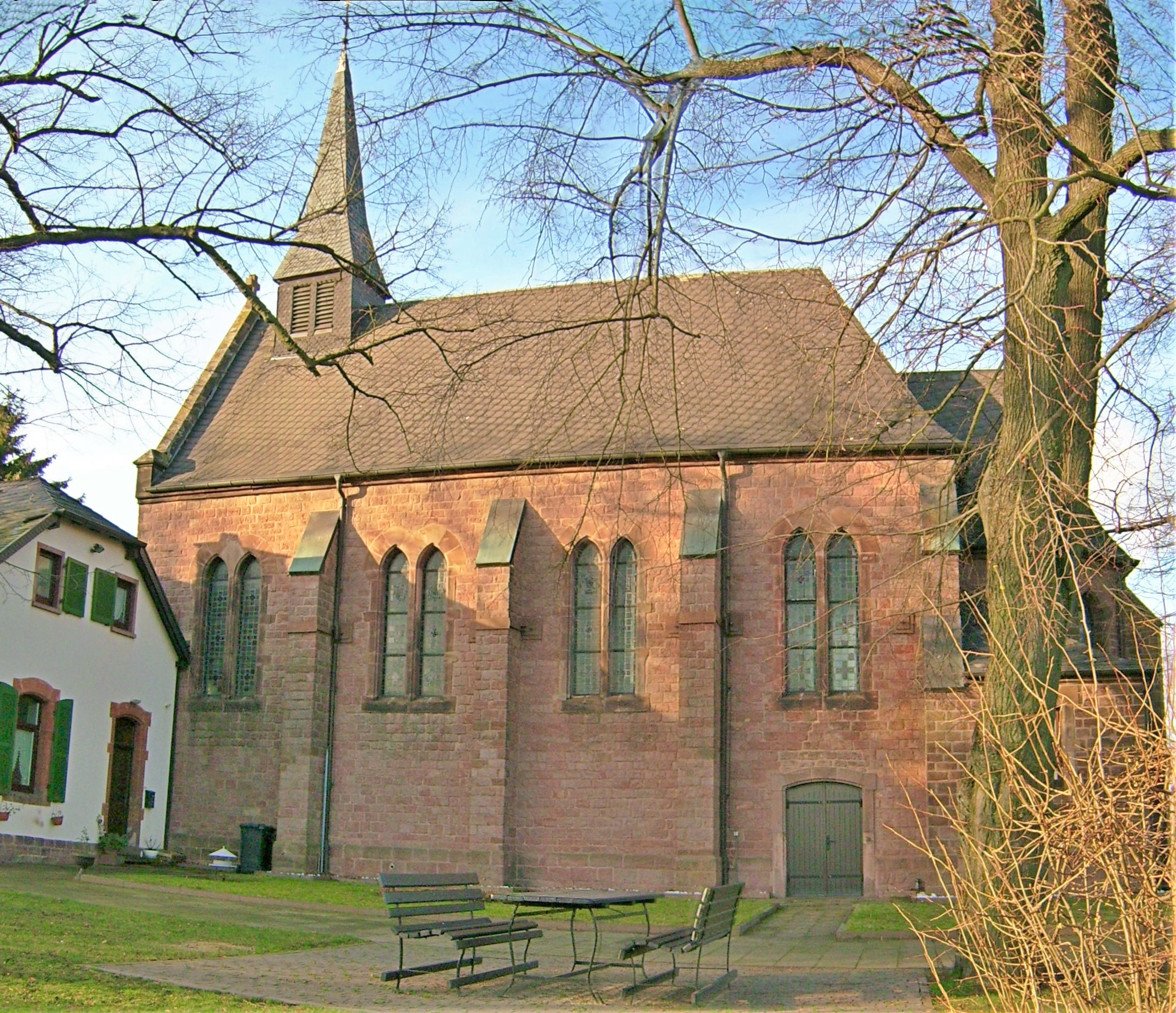 Bergkapelle in Illingen (Saar)